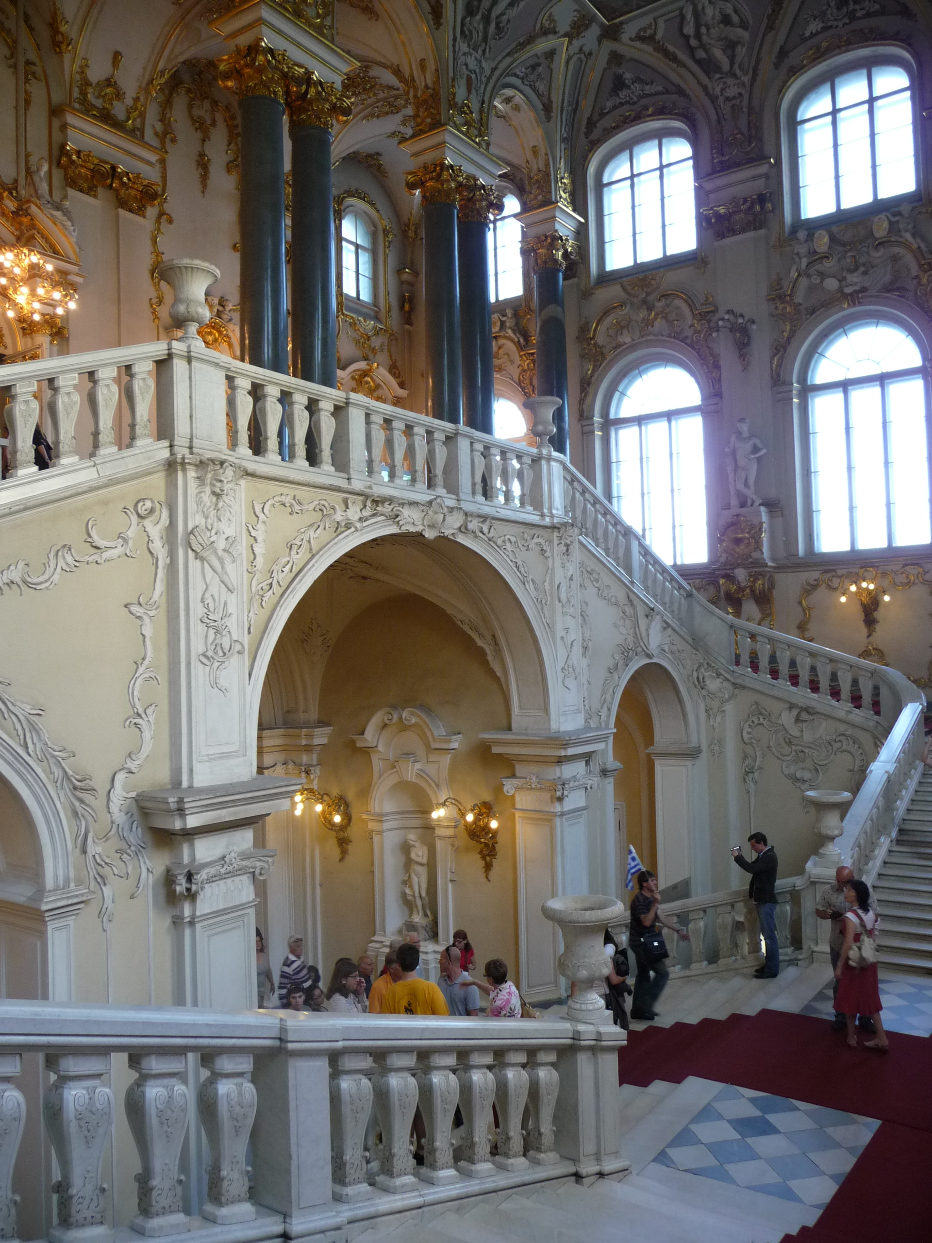 Palace-p1040004.jpg